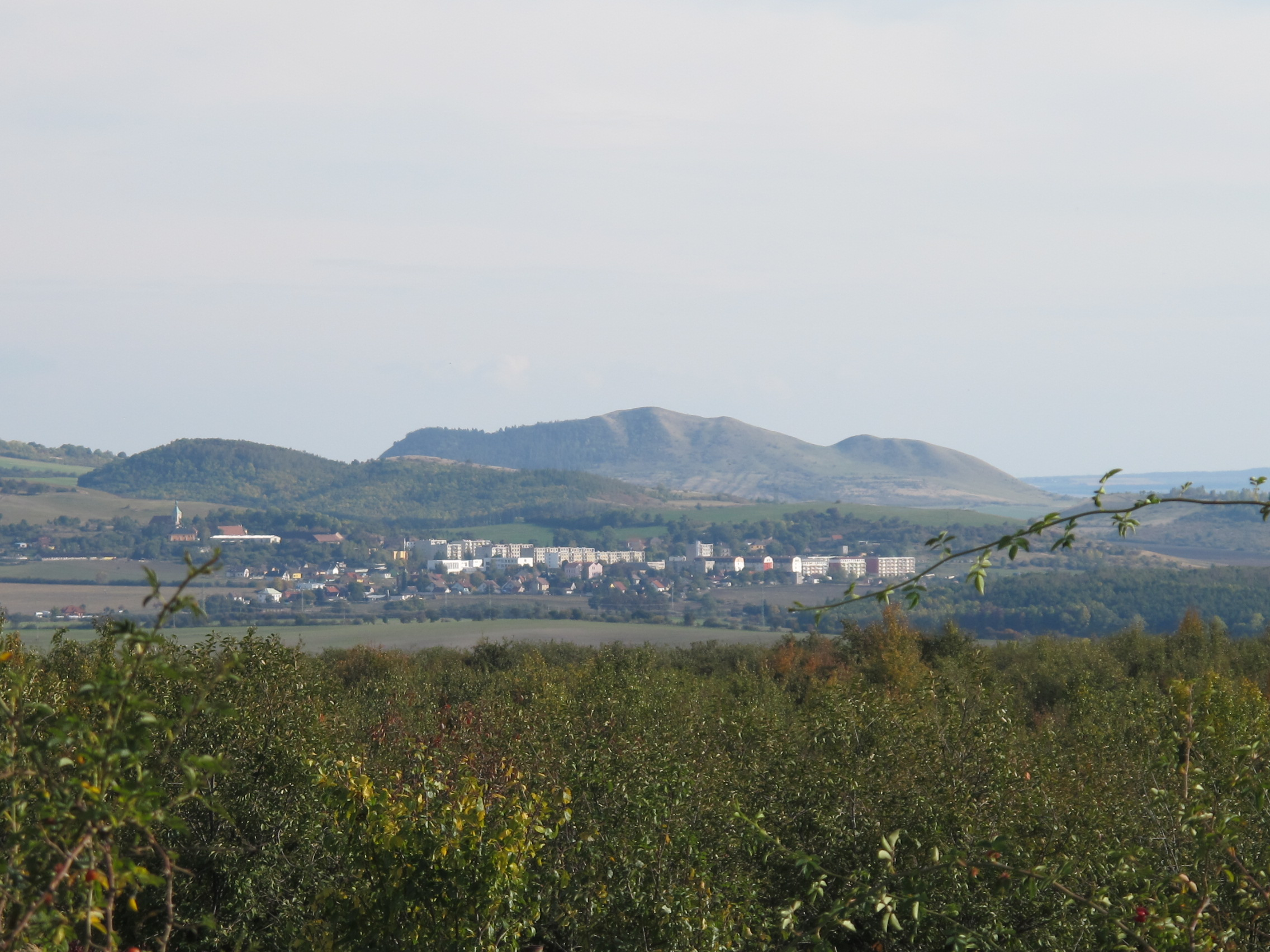 Bečov - pohled od Vtelna